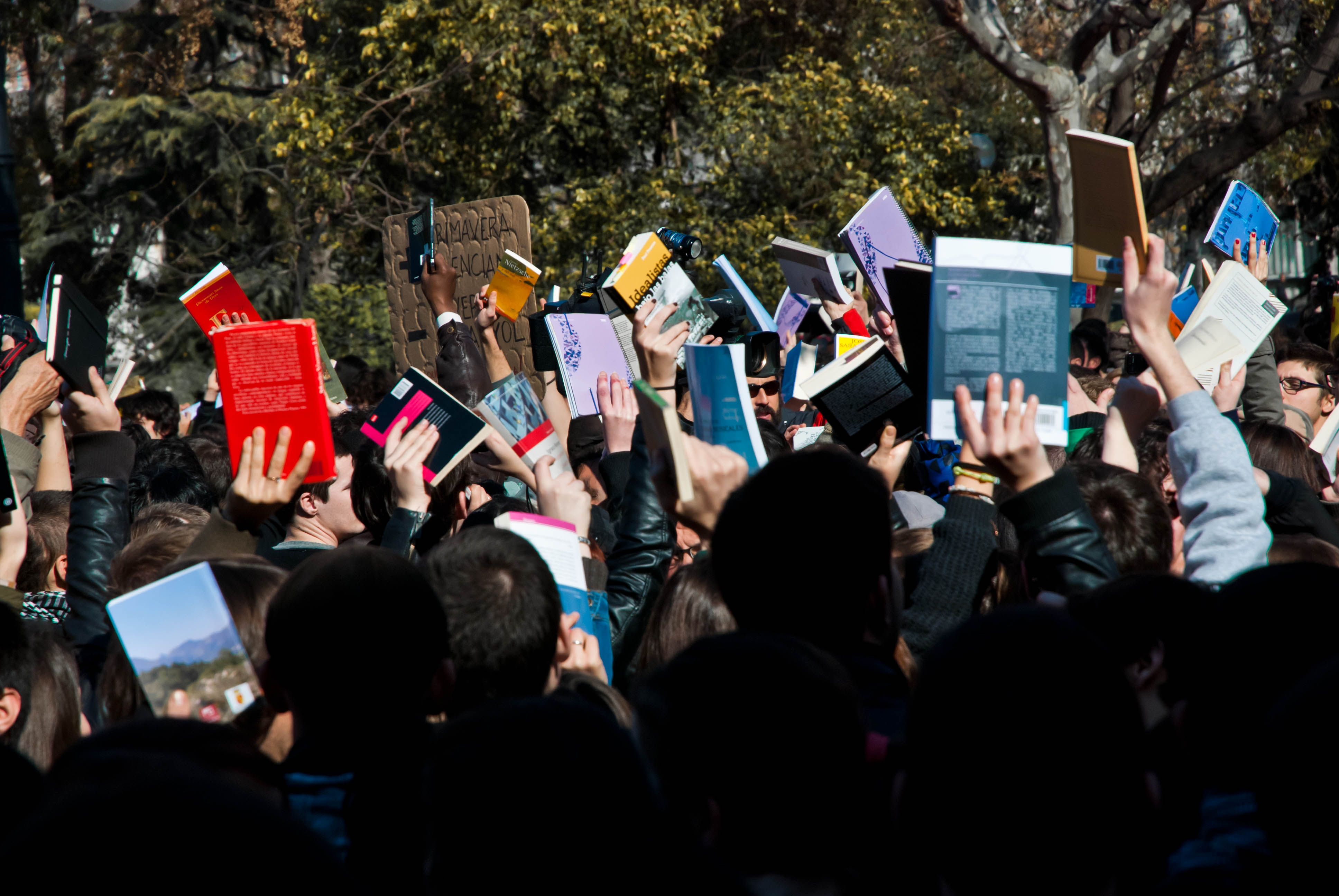 Manifestació a València el 21/2/2012